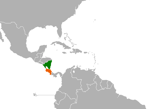 Costa Rica y Nicaragua.